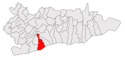 Categorie:Hărţi ale judeţului Călăraşi